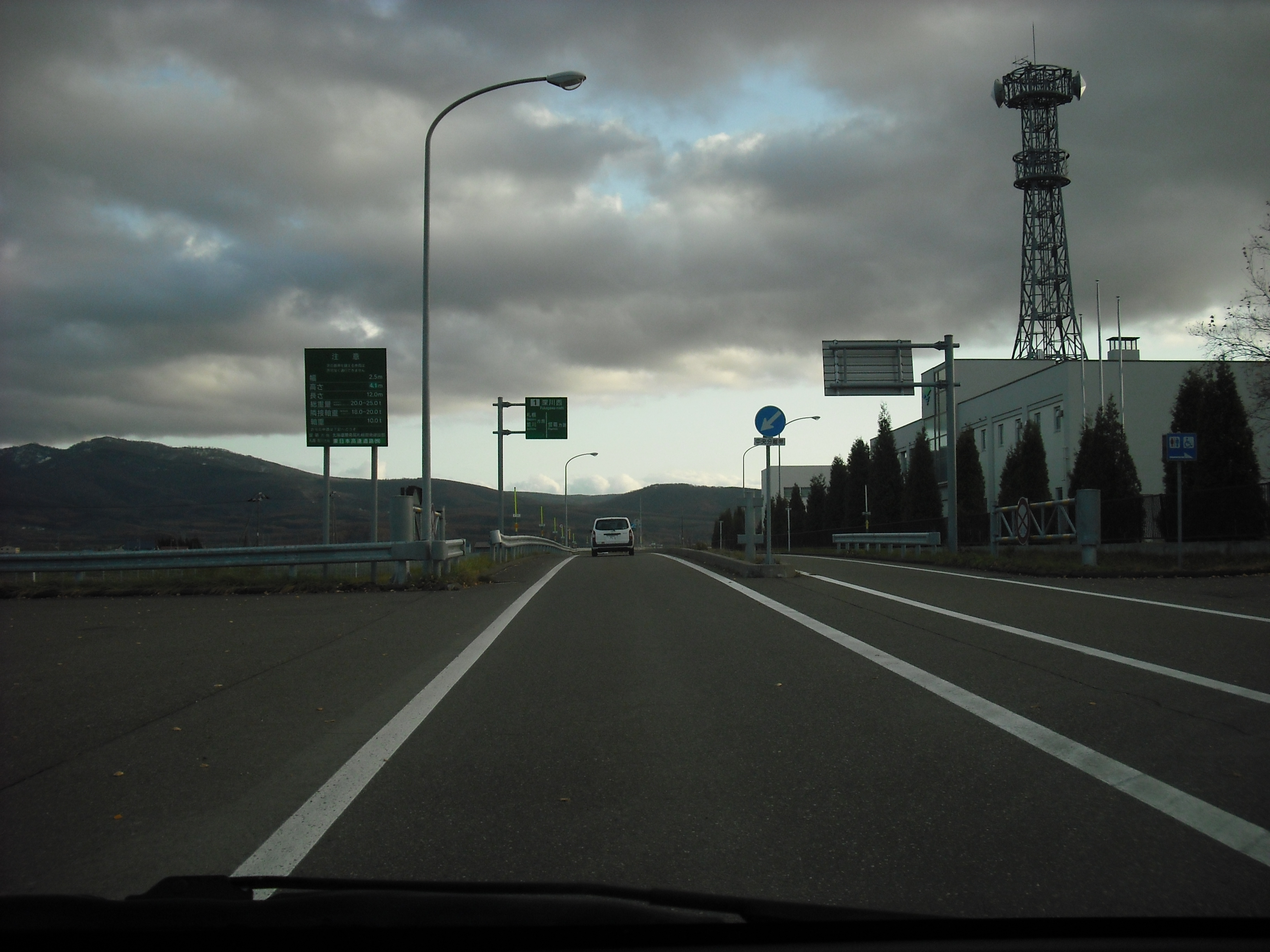 深川西ＩＣ（入口）